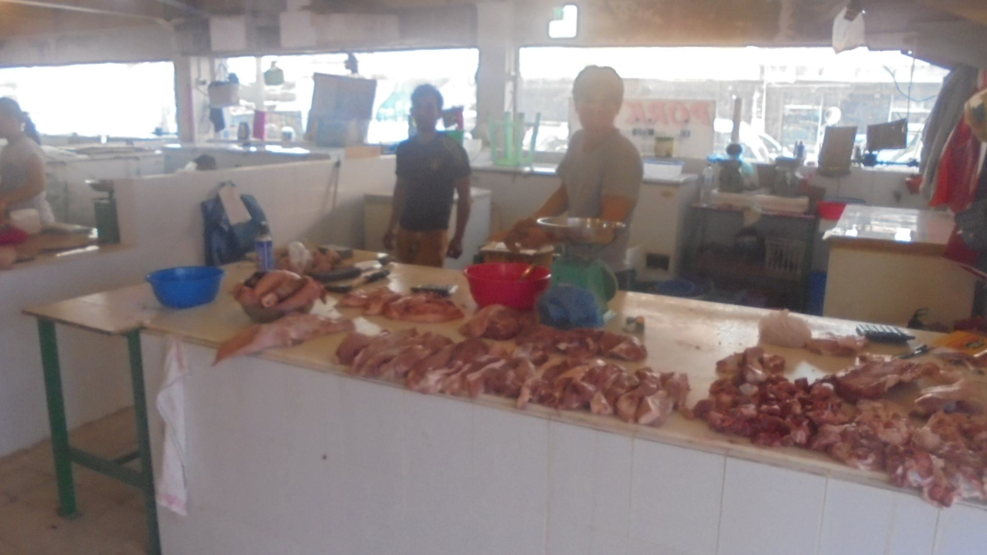 インドネシアの肉の市場です。